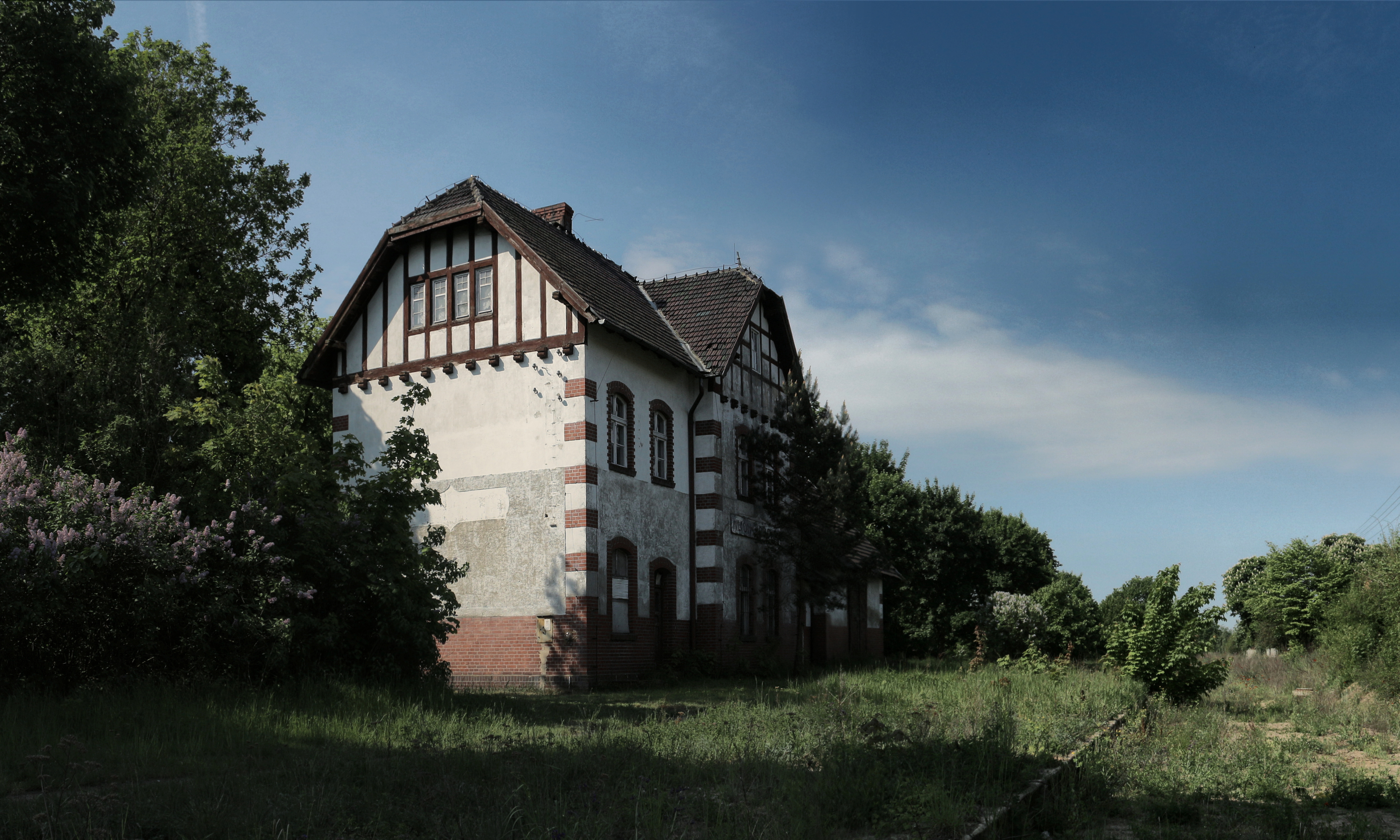 Wilków - przystanek kolejowy Wilków Głogowski (budynek dworca, budynek gospodarczy wraz z łącznikiem, budynek gospodarczy), poł. XIX